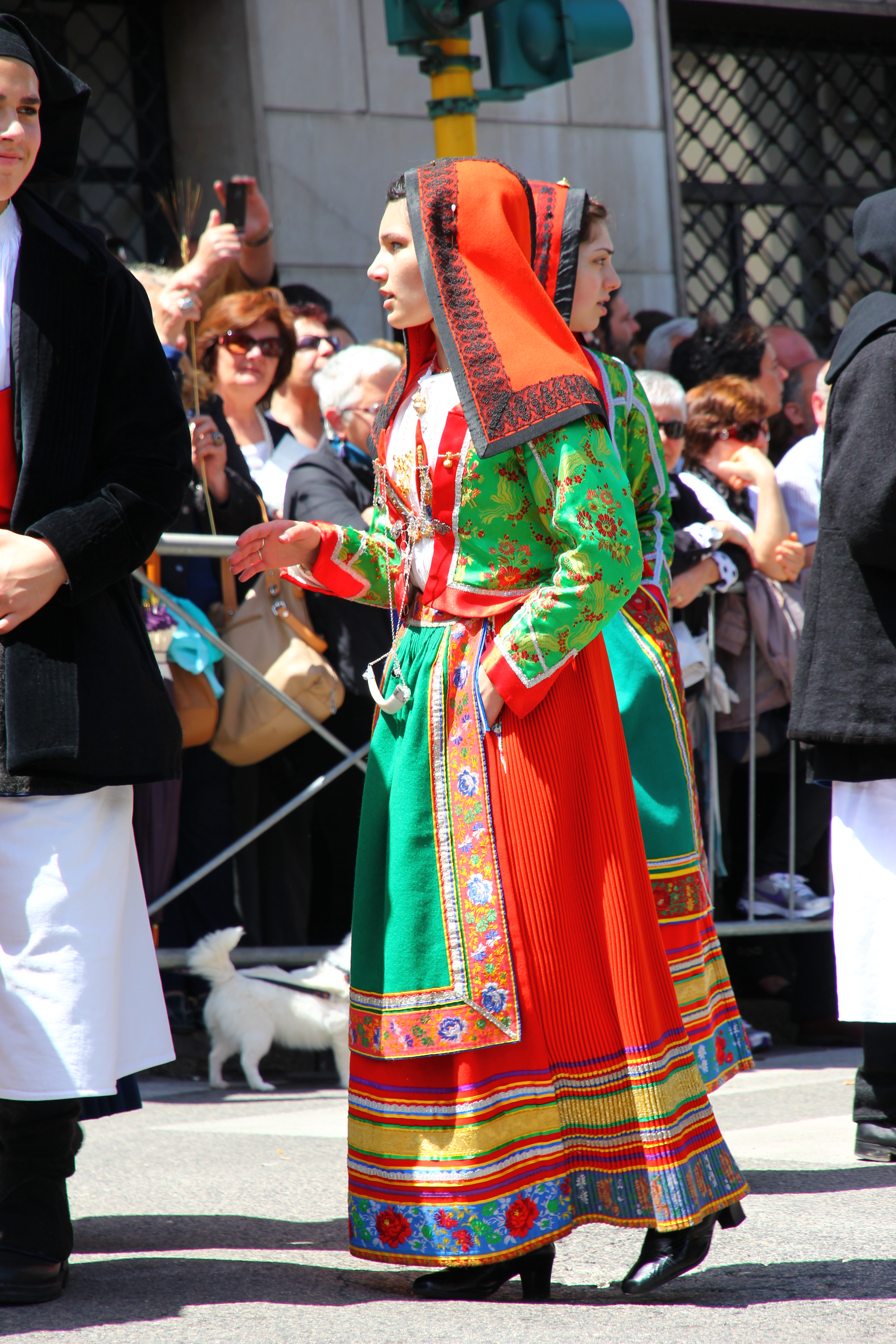 Cavalcata Sarda 2013 (Sassari)